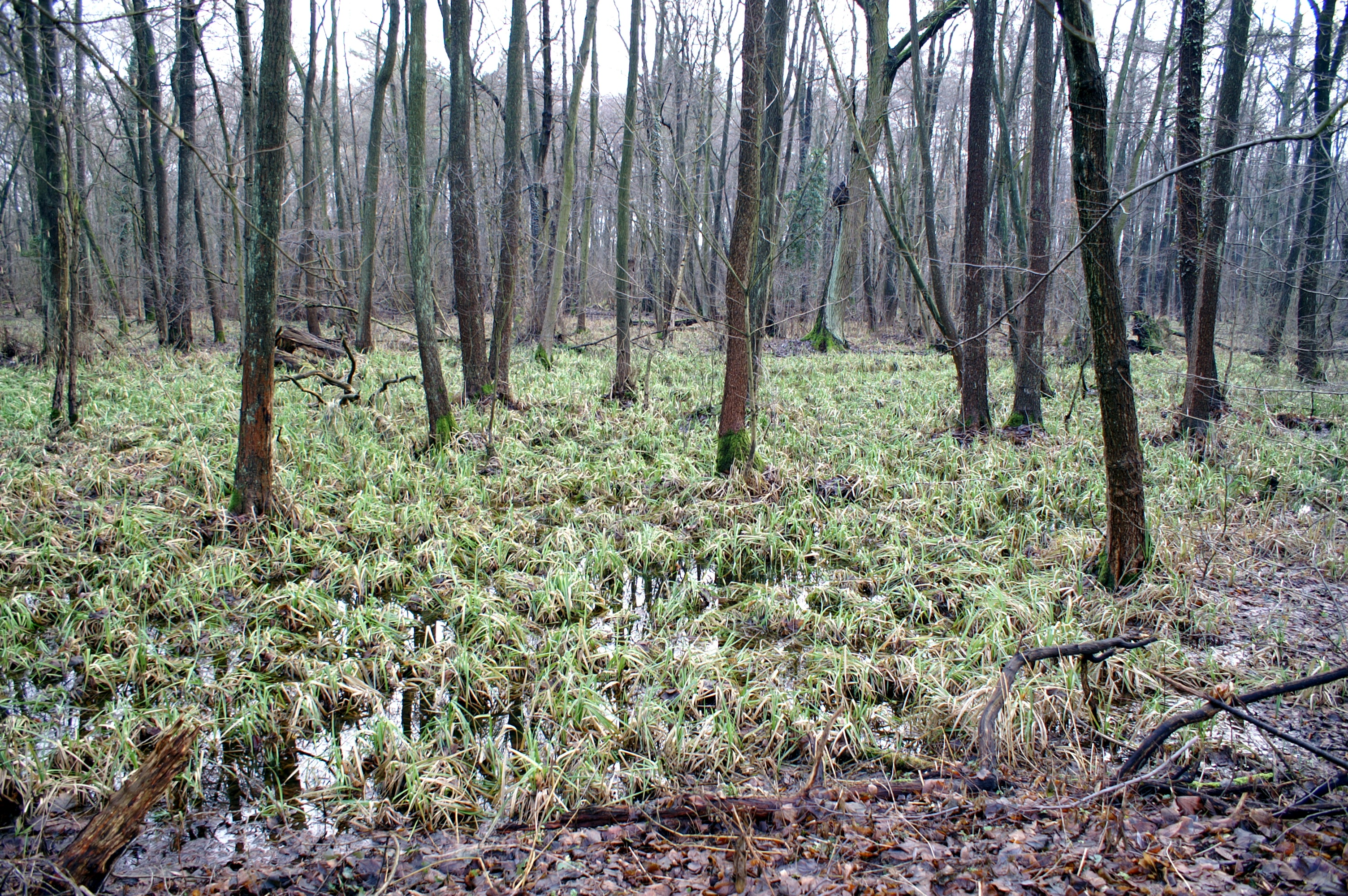 Naturschutzgebiet Ausstichgelände Röntgental, Blick von der Buchenallee Richtung Süden